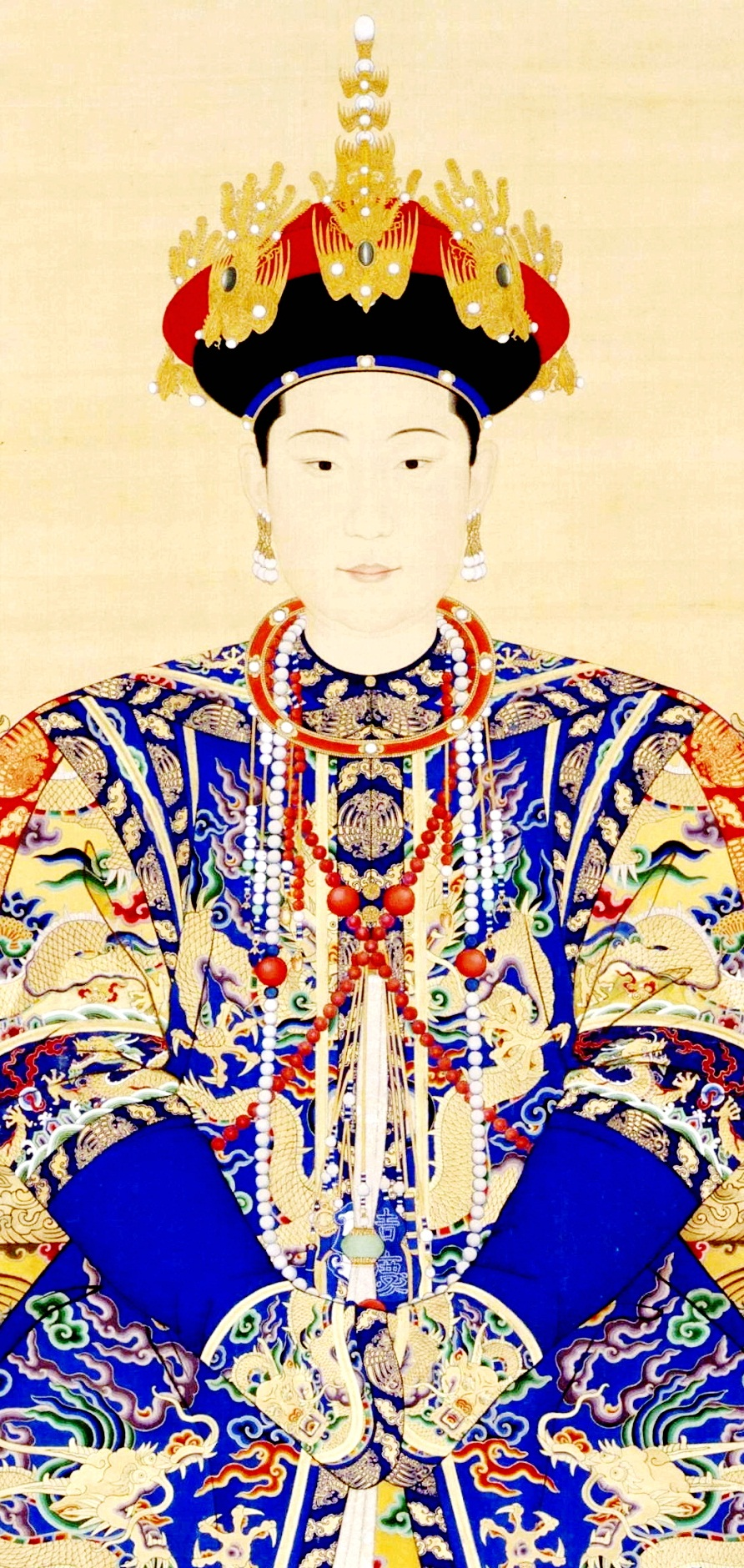 雍正皇后肖像